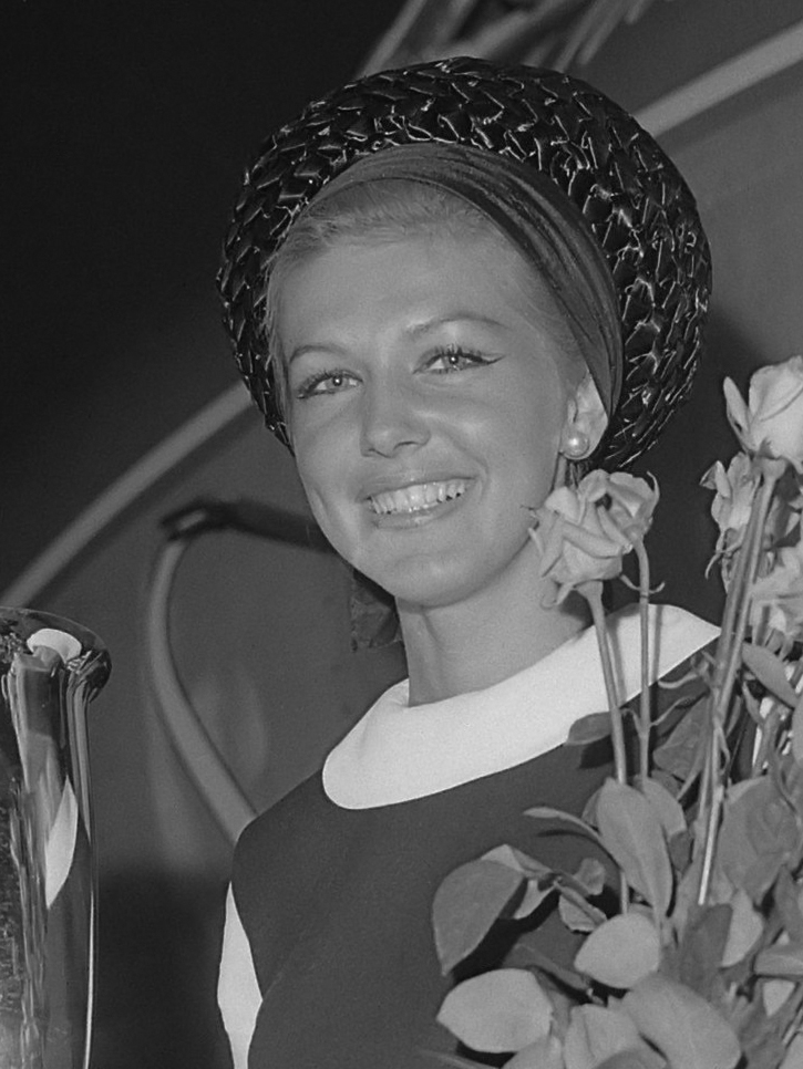 Aankomst van Elly Koot (miss Europa) op Schiphol 12 juni 1964